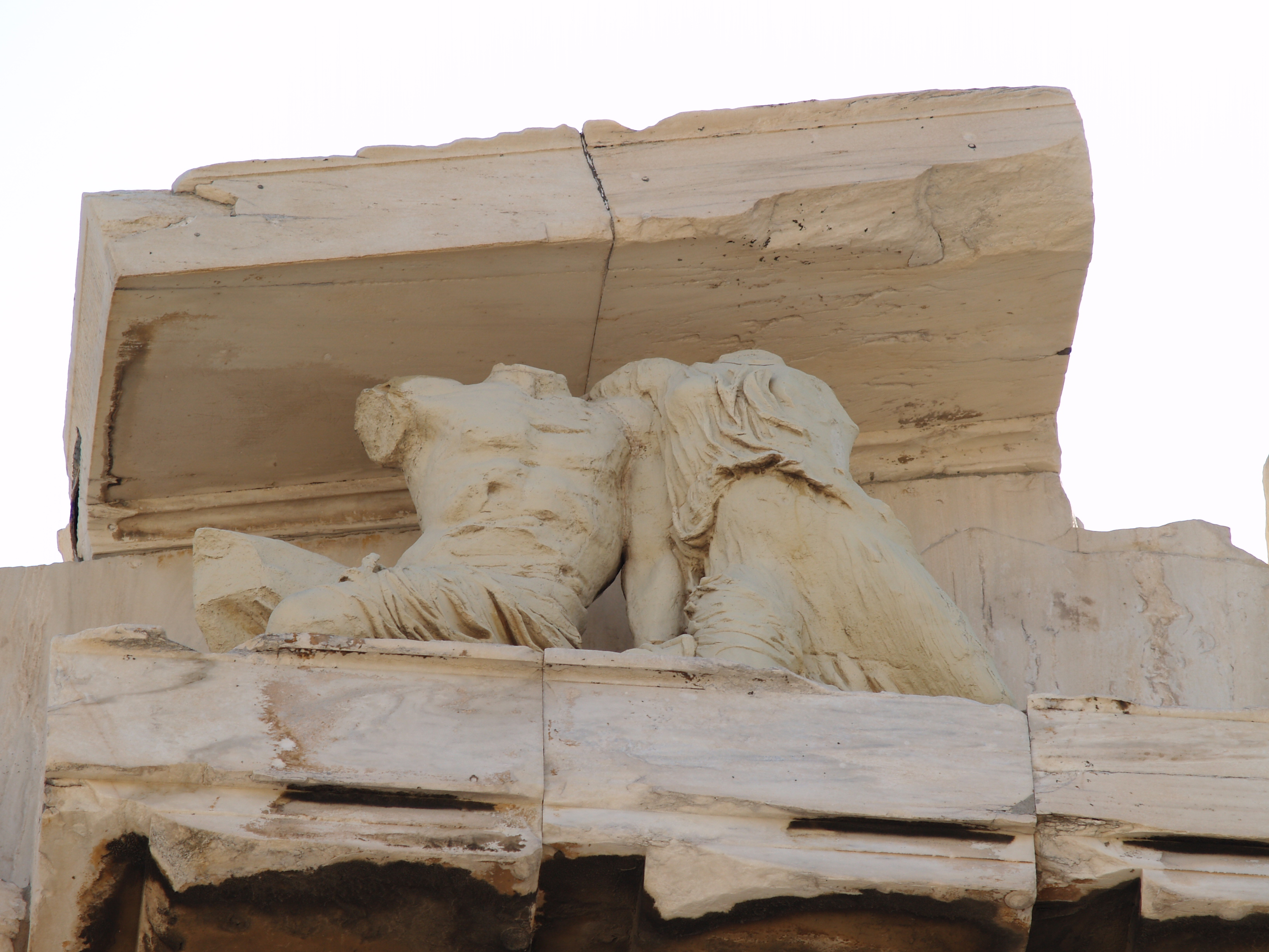 Esculturas del ángulo noroeste del frontón del Partenón, Acrópolis de Atenas, Grecia